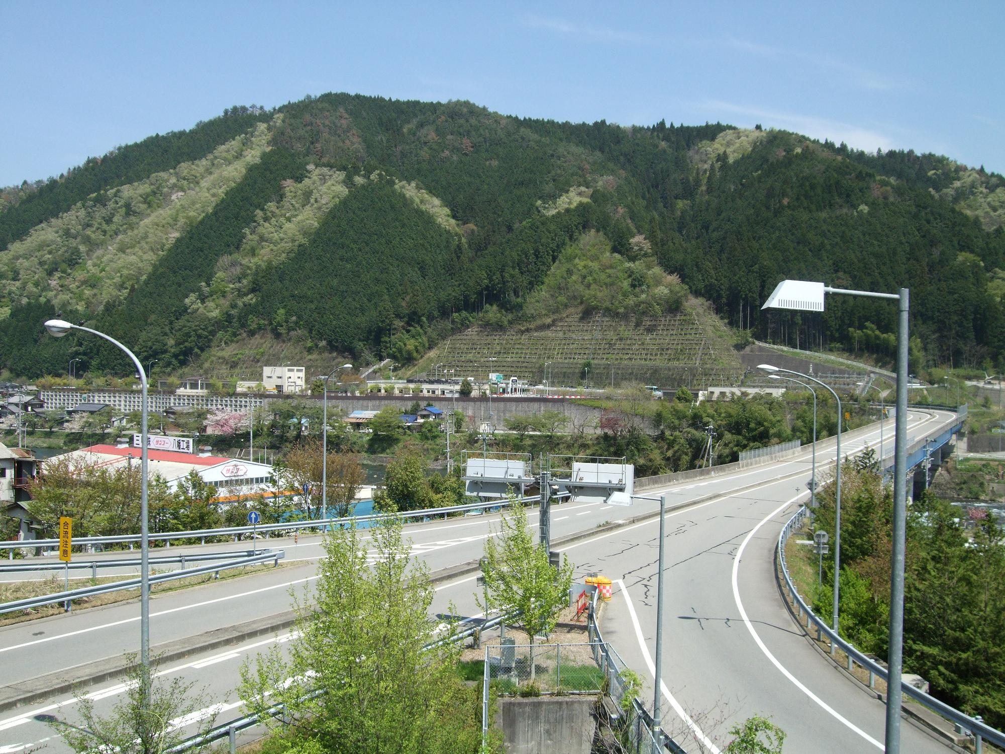 東海北陸自動車道 郡上八幡インターチェンジの料金所を撮影 2008.4.22 投稿者が撮影